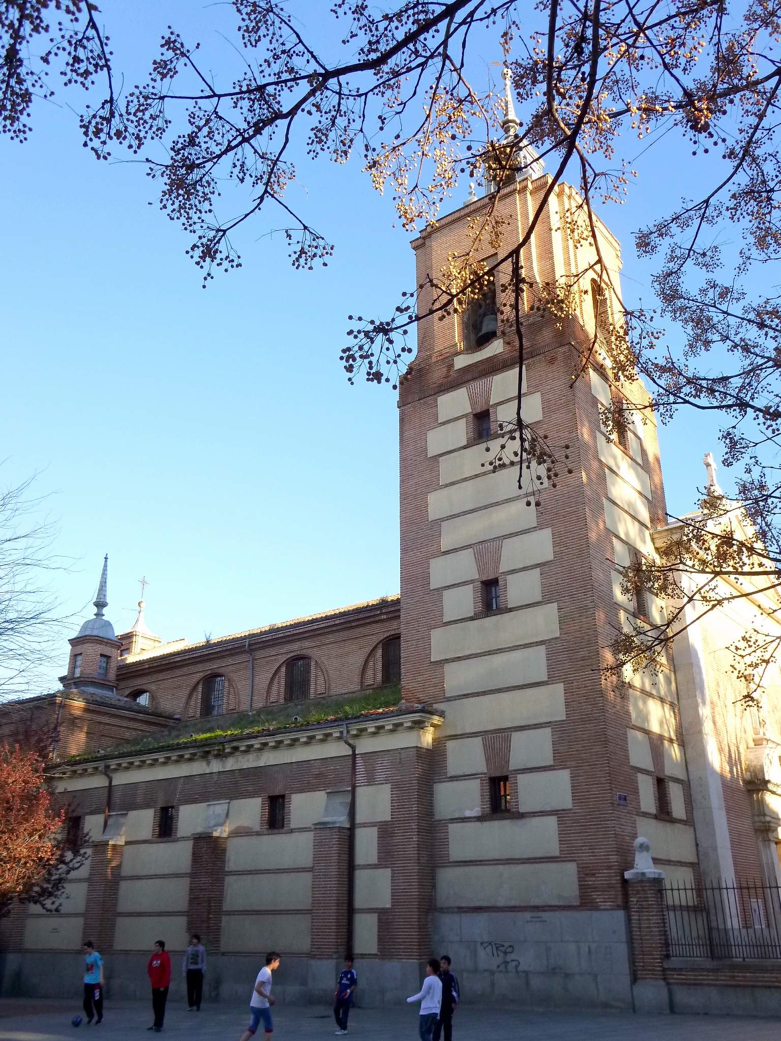 Iglesia de San Sebastián Mártir (Carabanchel, Madrid)